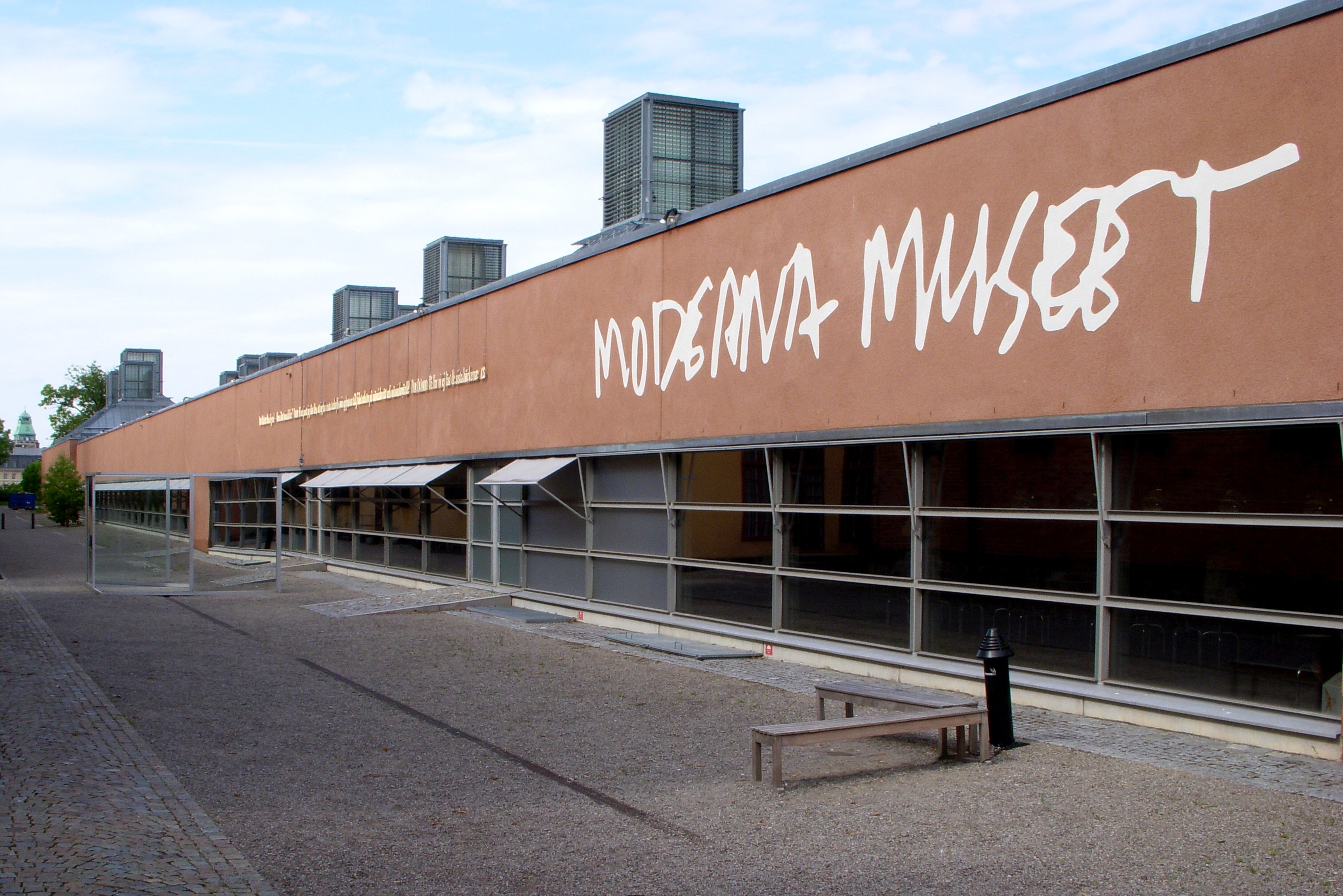 Moderna museet, Skeppsholmen, Stockholm